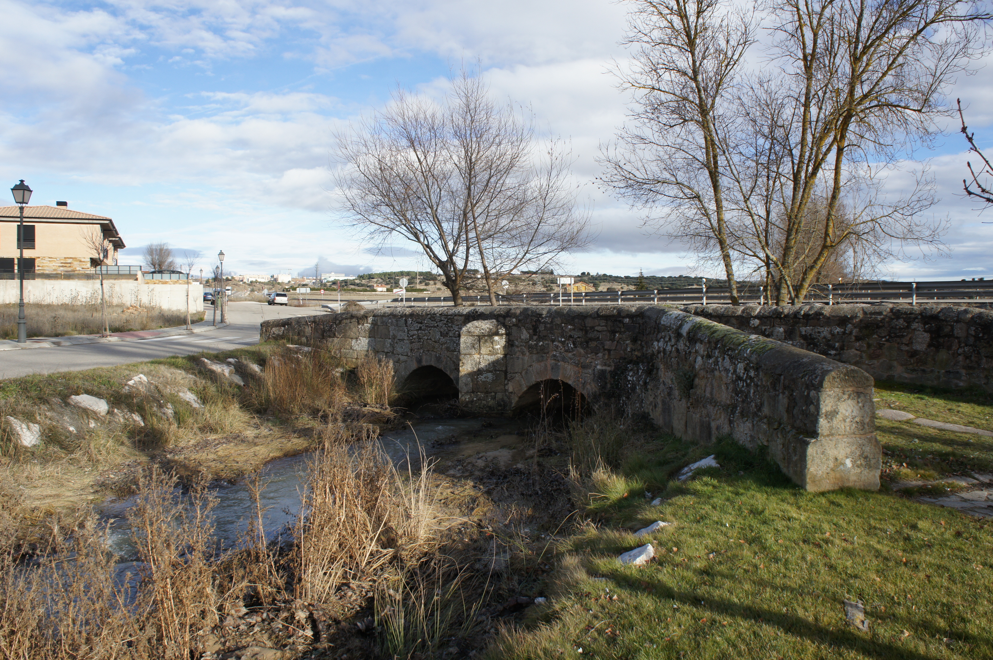 Puentecillo de origen romano sobre el río Golmayo en el pueblo homónimo de la provincia de Soria.